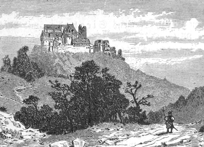 Burg Scharzfels